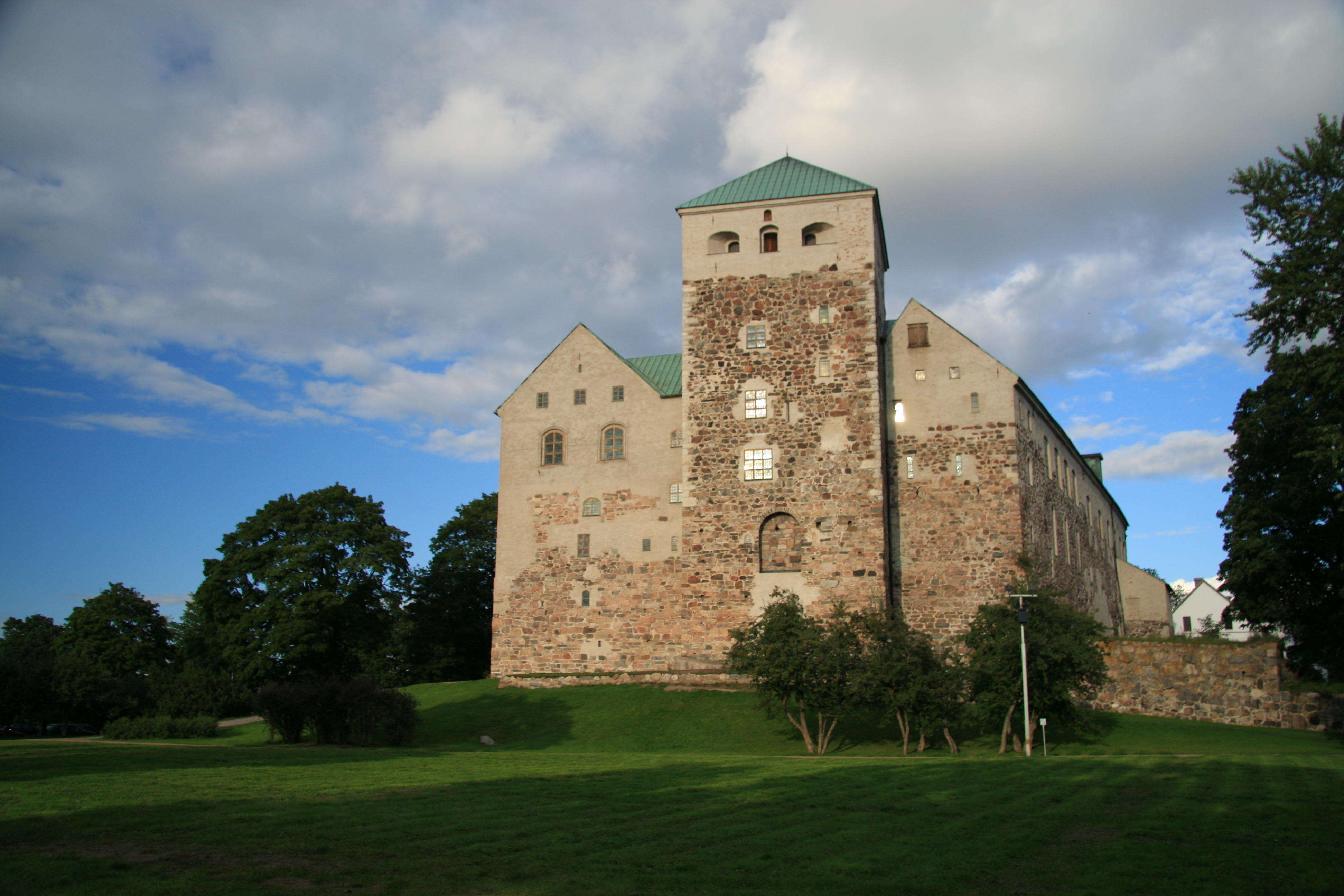 Turku